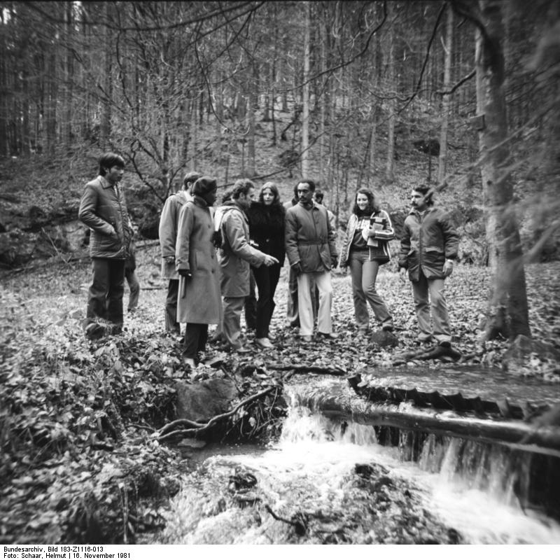 ADN-ZB/Schaar/16.11.1981/Bez. Suhl: Junge Wissenschaftler aus vier Kontinenten besuchten das Naturschutzgebiet Vessertal, das zu den von der UNESCO anerkannten biosphären Reservaten zählt. Während ihres zehnmonatigen Studienaufenthaltes an der TU Dresden machen sich die Chemiker, Biologen und Geographen mit Möglichkeiten des Umweltschutzes vertraut.